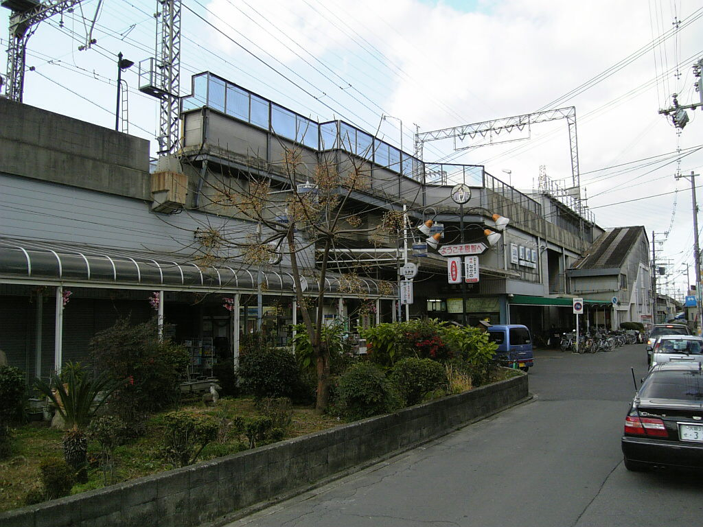 近鉄恩智駅 2007年1月撮影。 機材：V604SH 撮影者：Kansai explorer Category:八尾市の画像 Category:鉄道駅画像